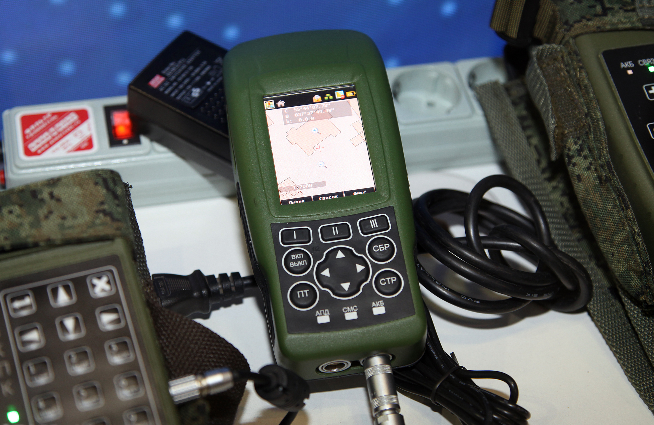 Носимый приемоиндикатор НПИ2 для солдата (Soldier device NPI2)